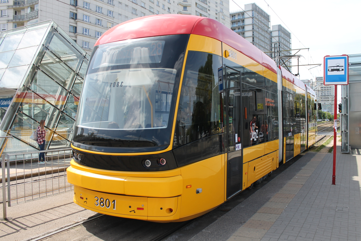 Tył tramwaju Pesa Jazz 134N #3801.